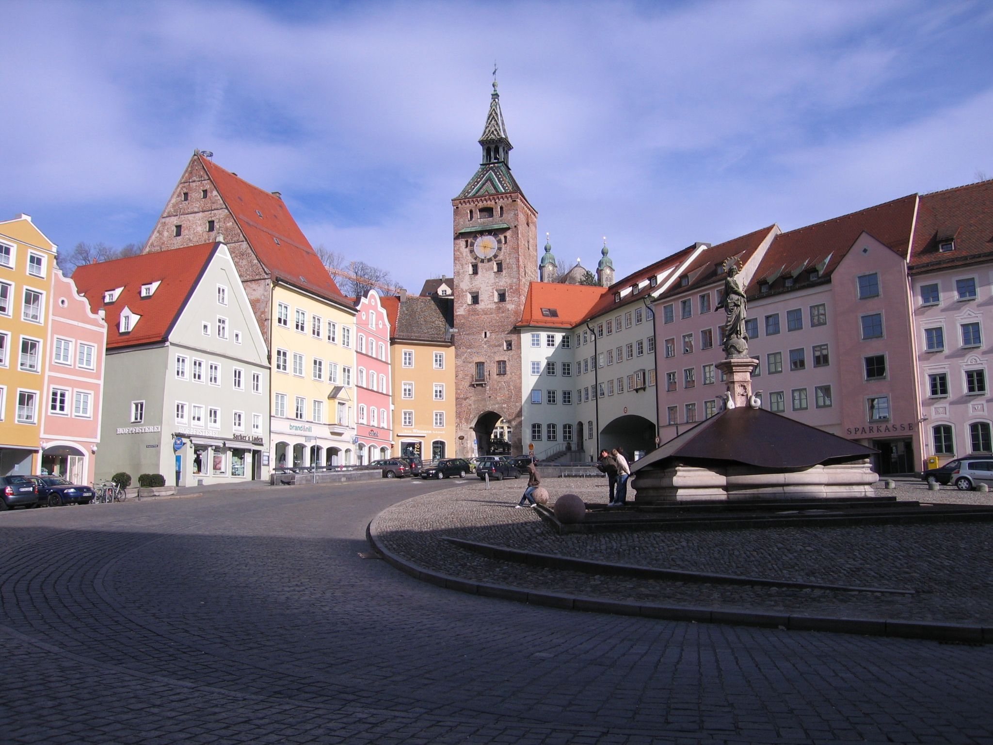 Hauptplatz mit Schmalzturm in Landsberg am Lech